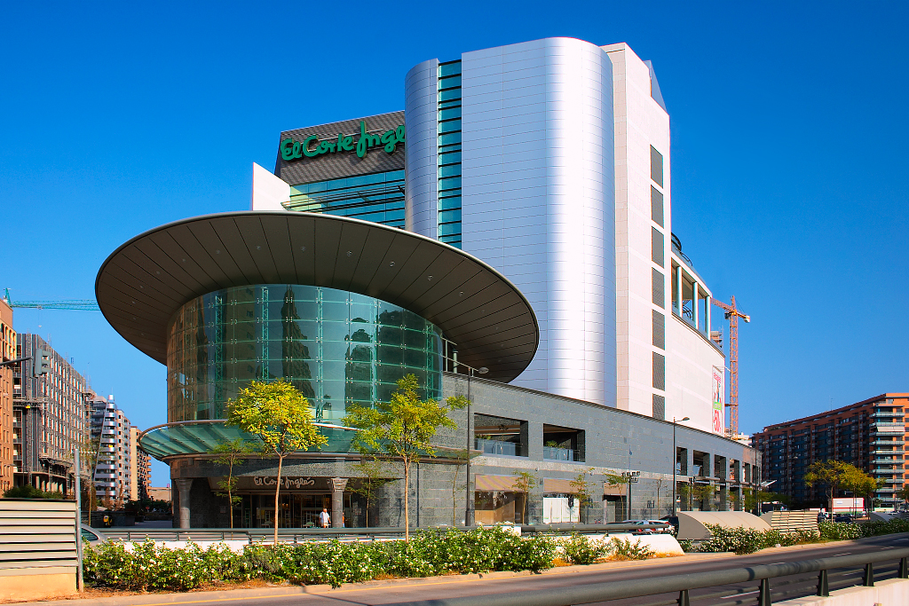 Edificio de la cadena de grandes almacenes El Corte Ingles